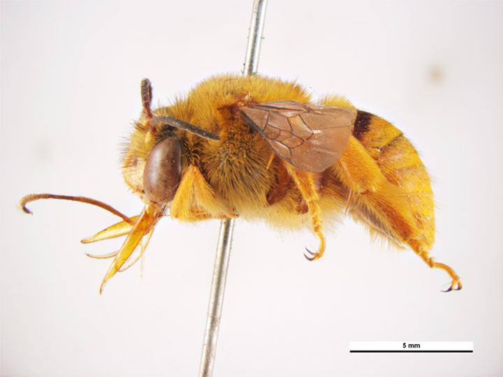 Amegilla (Asaropoda) bombiformis Lateral Image - Male